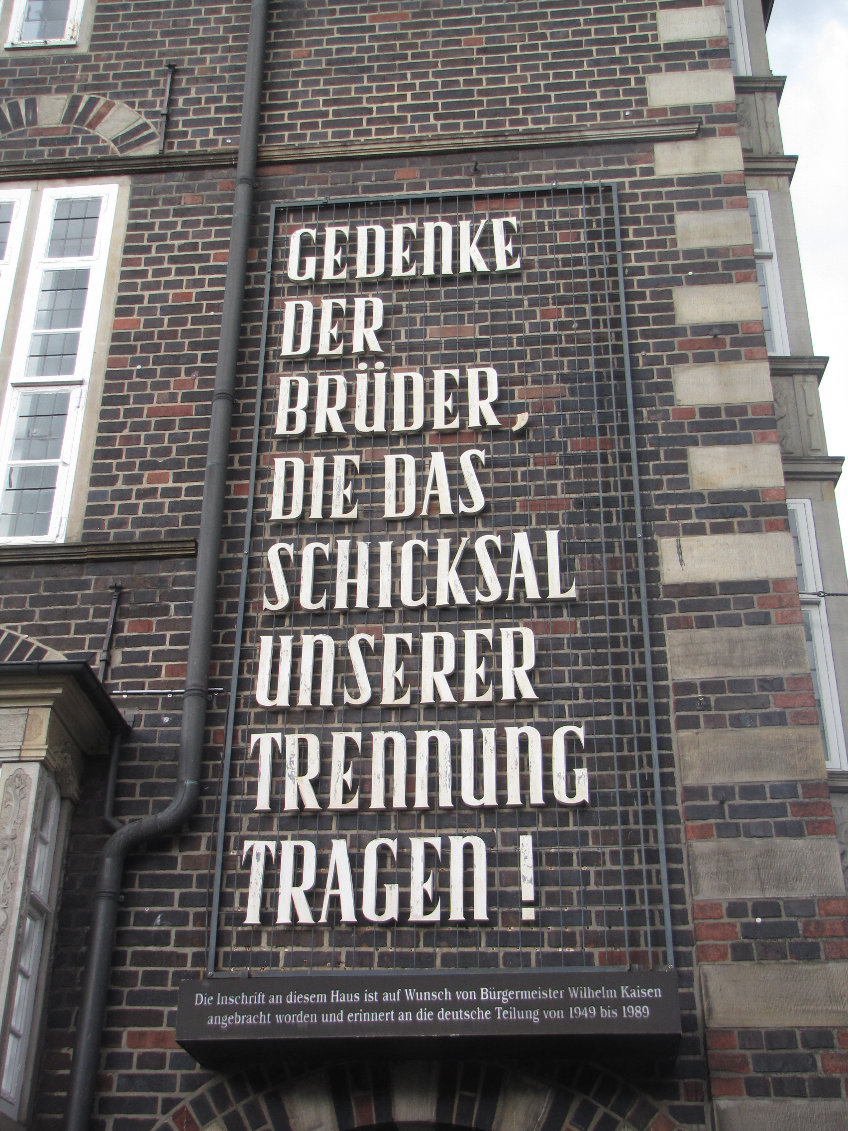 Rathscafé, Deutsches Haus in Bremen, Am Markt 1Das abgebildete Objekt ist ein geschütztes Kulturdenkmal in der Freien Hansestadt Bremen, mit der Nr. 0068 beim Landesamt für Denkmalpflege registriert.